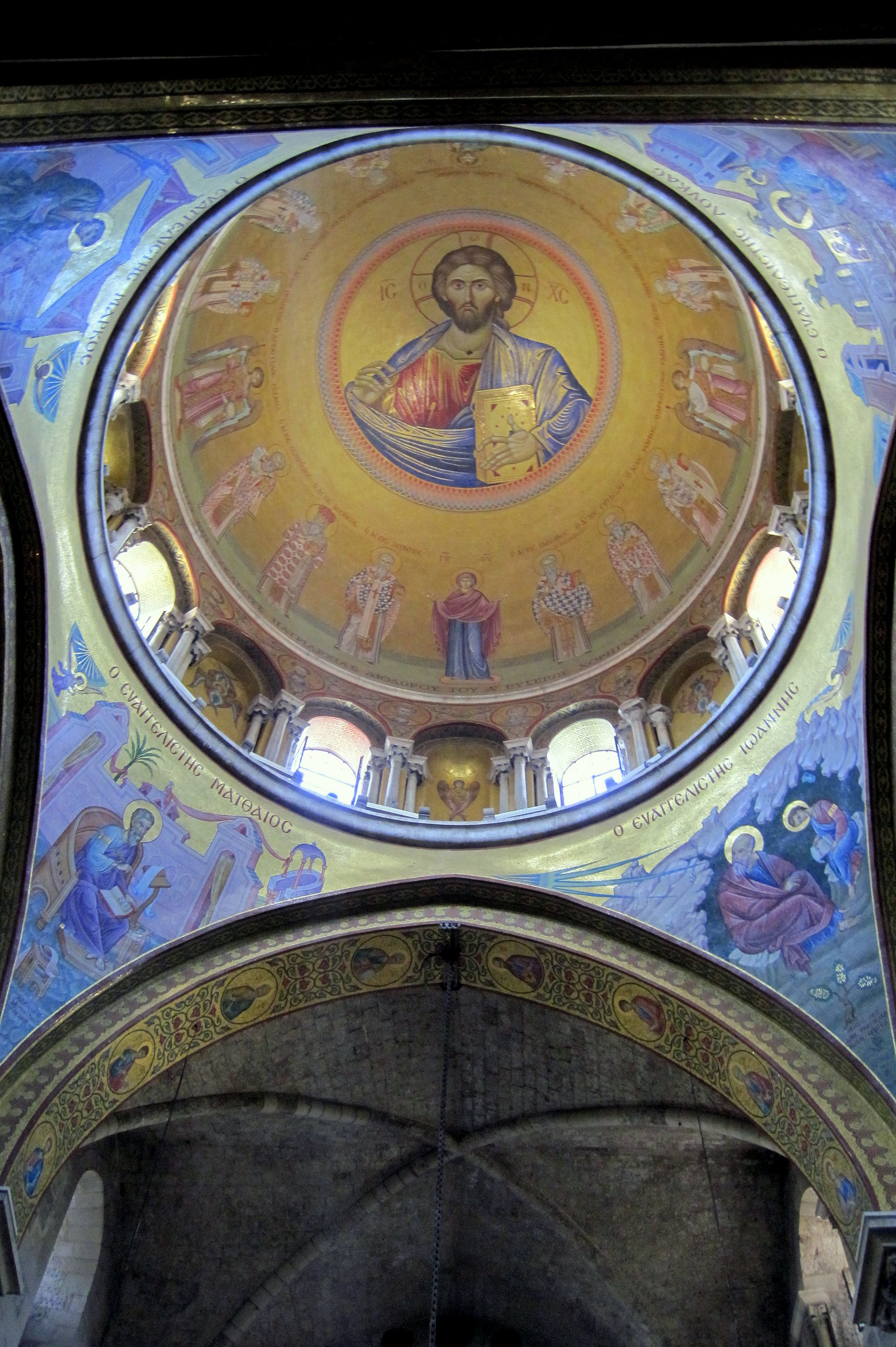 הפטריארכיה היוונית בעיצובו של האדריכל קריסטודולוס ספירודונידיס ברובע הנוצרי של העיר העתיקה בירושלים